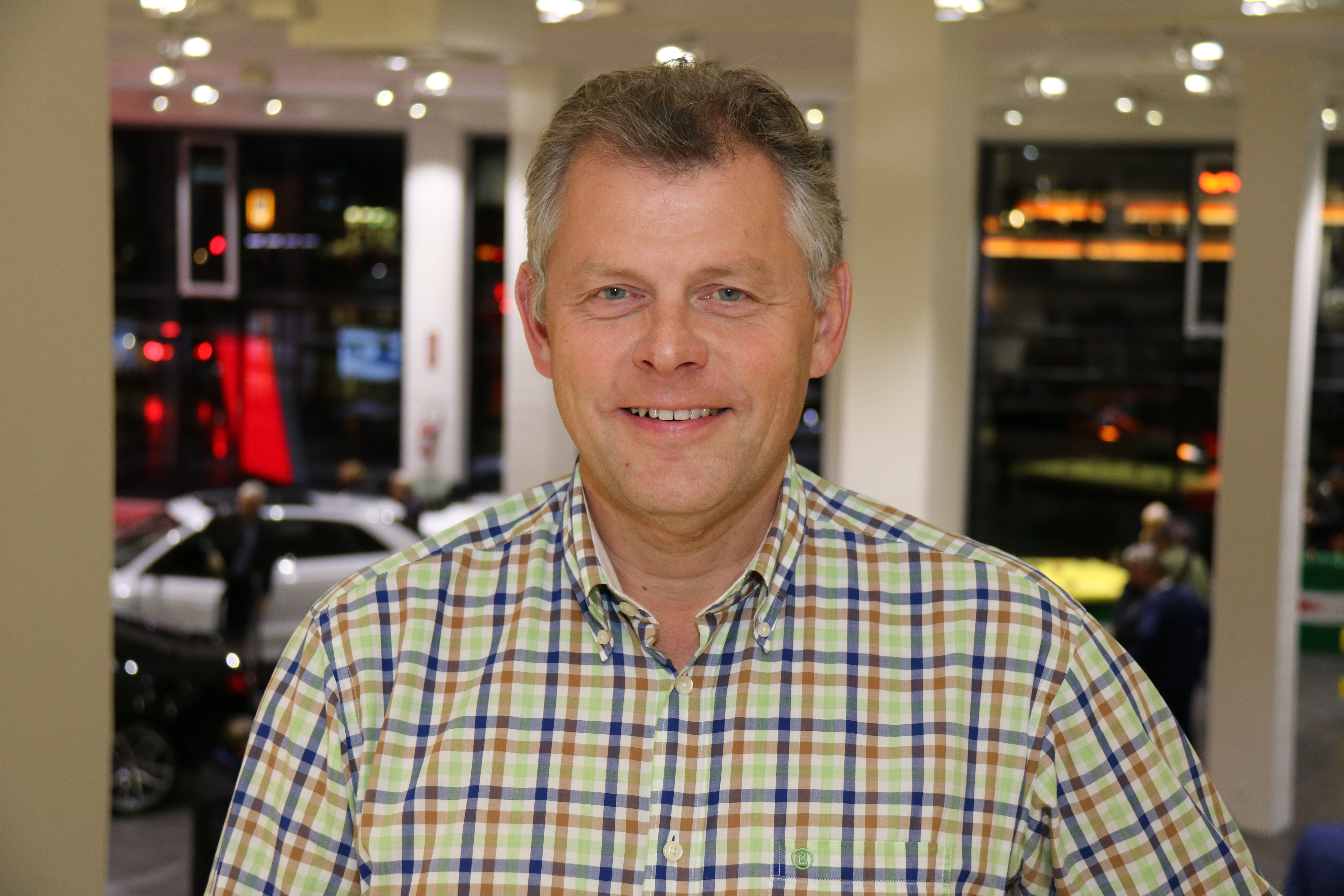 Portrait Andreas Kleeb, 2016